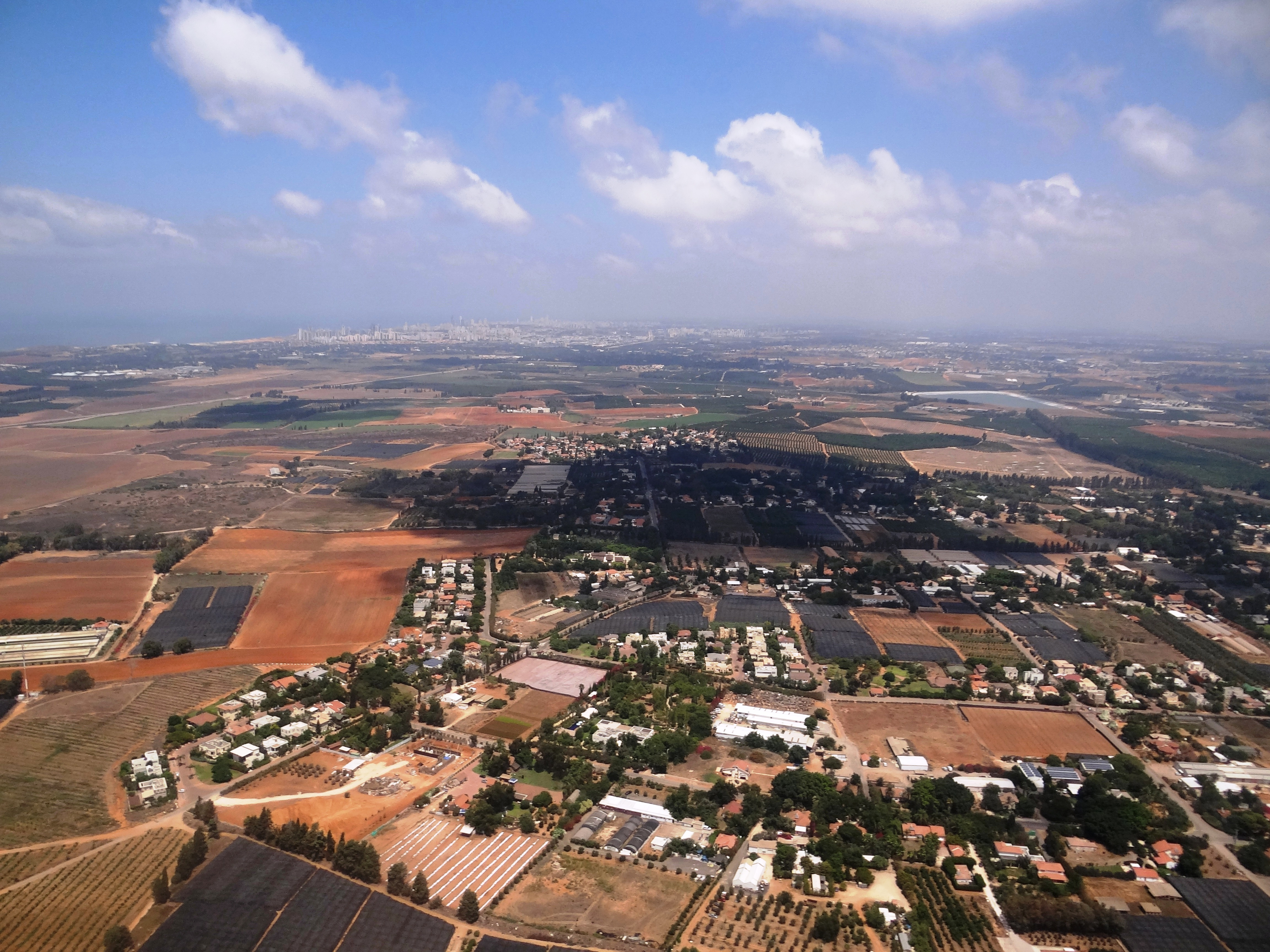 היישוב בני ציון בשרון